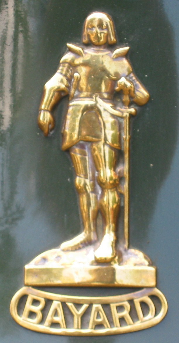 Emblem Clément-Bayard 1907